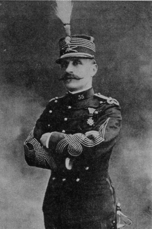 Maréchal Foch (1851-1929) sous le grade de Colonel du 35 RA de Vannes entre 1903 et 1905